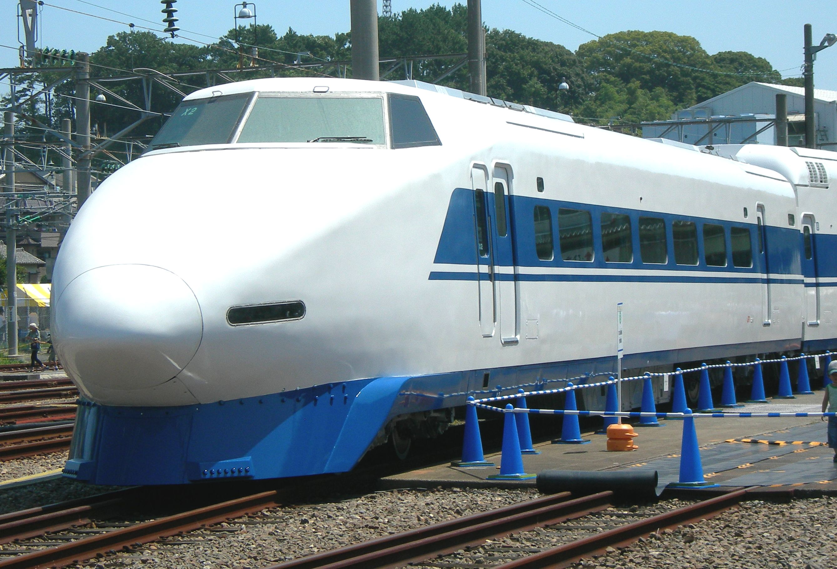 新幹線100系